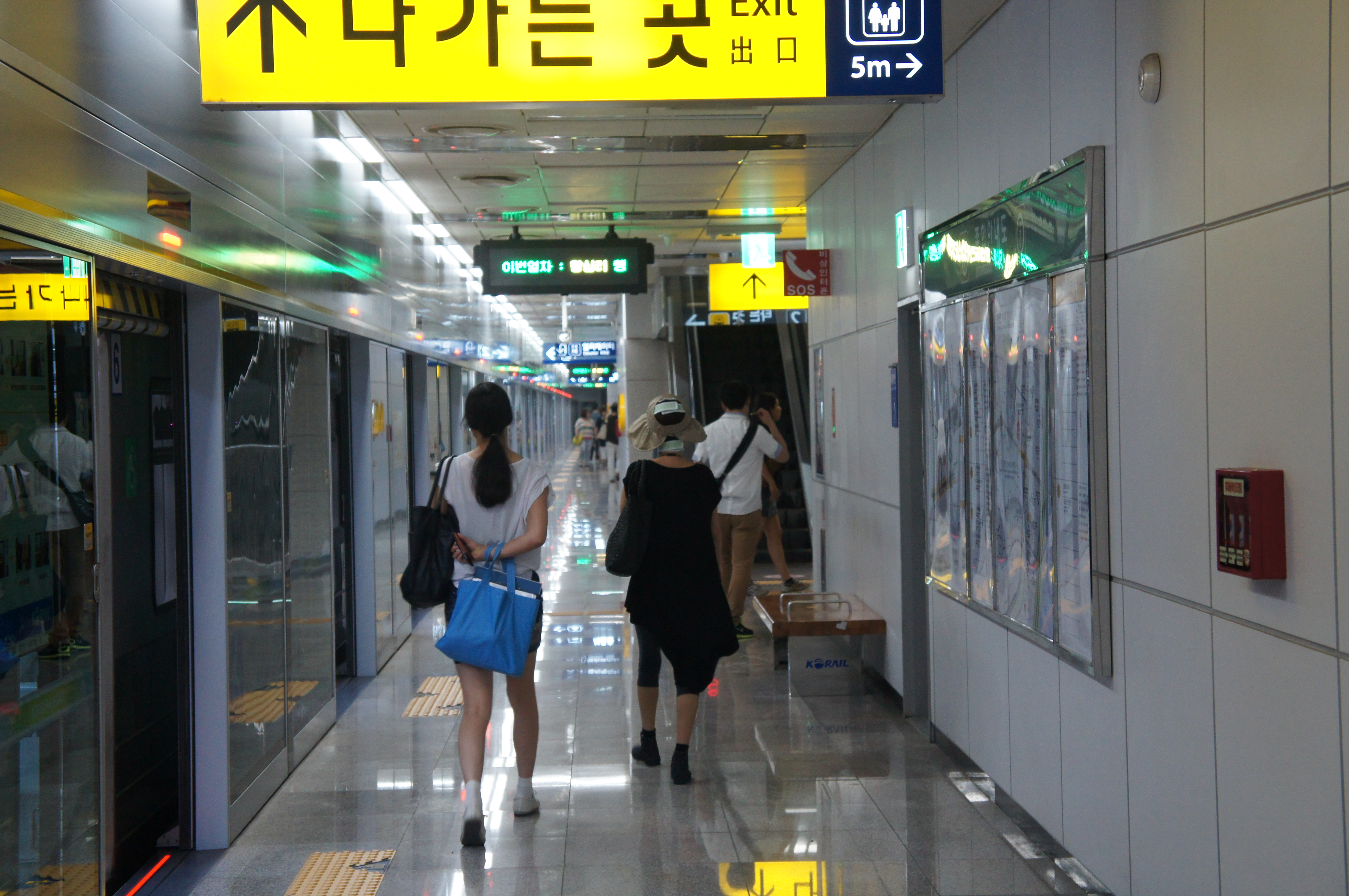 서울숲역 승강장